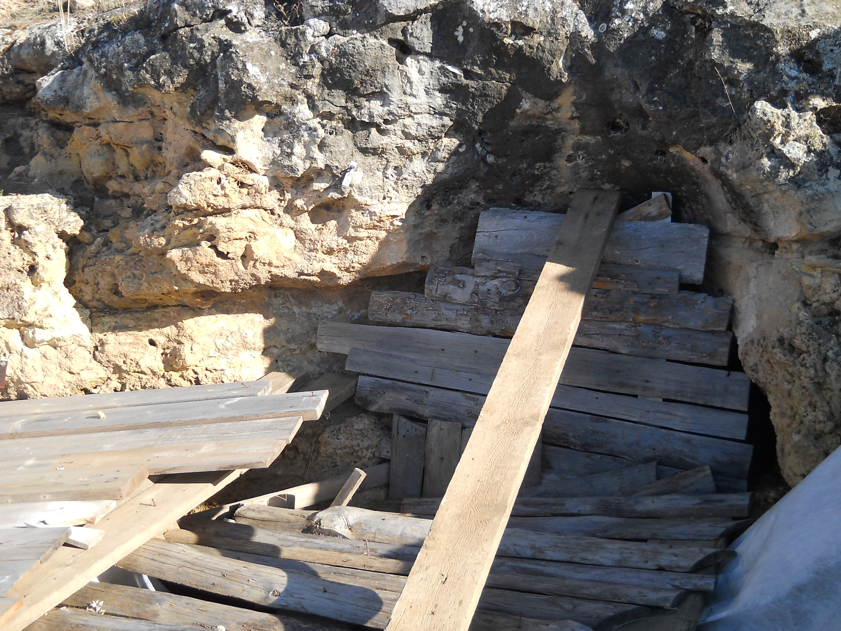 Entrada a la Cueva de la Buena Pinta, yacimiento arqueológico de los Calveros, Pinilla del Valle, Madrid, España